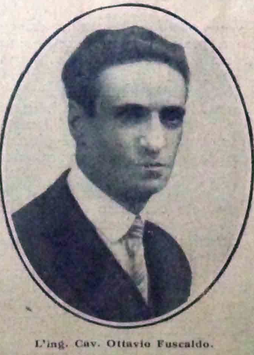 Ritratto dell'Ing. Ottavio Fuscaldo